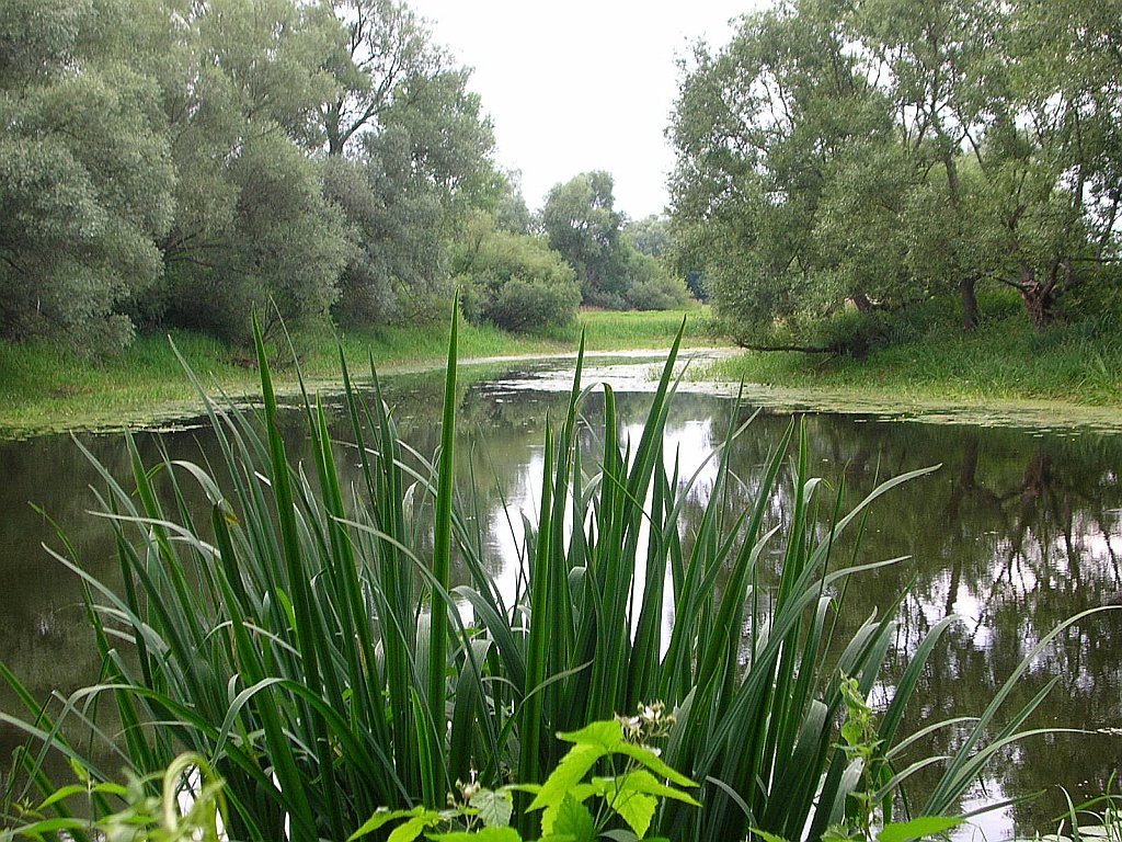 Rezerwat przyrody Wielka Kępa Ostromecka k Bydgoszczy